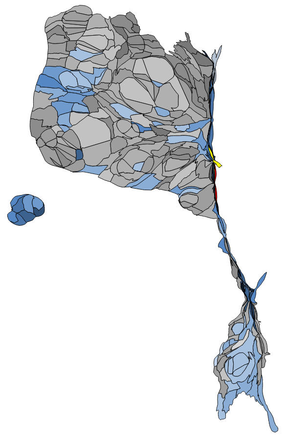 中文（台灣）: 顏色對照表 屏東縣春日鄉力里村 蘇震清、周嘉琪、張怡各拿下2票，何麗莉1票 標示為黃色 屏東縣春日鄉士文村 蘇震清、張怡各拿下2票 標示為紅色